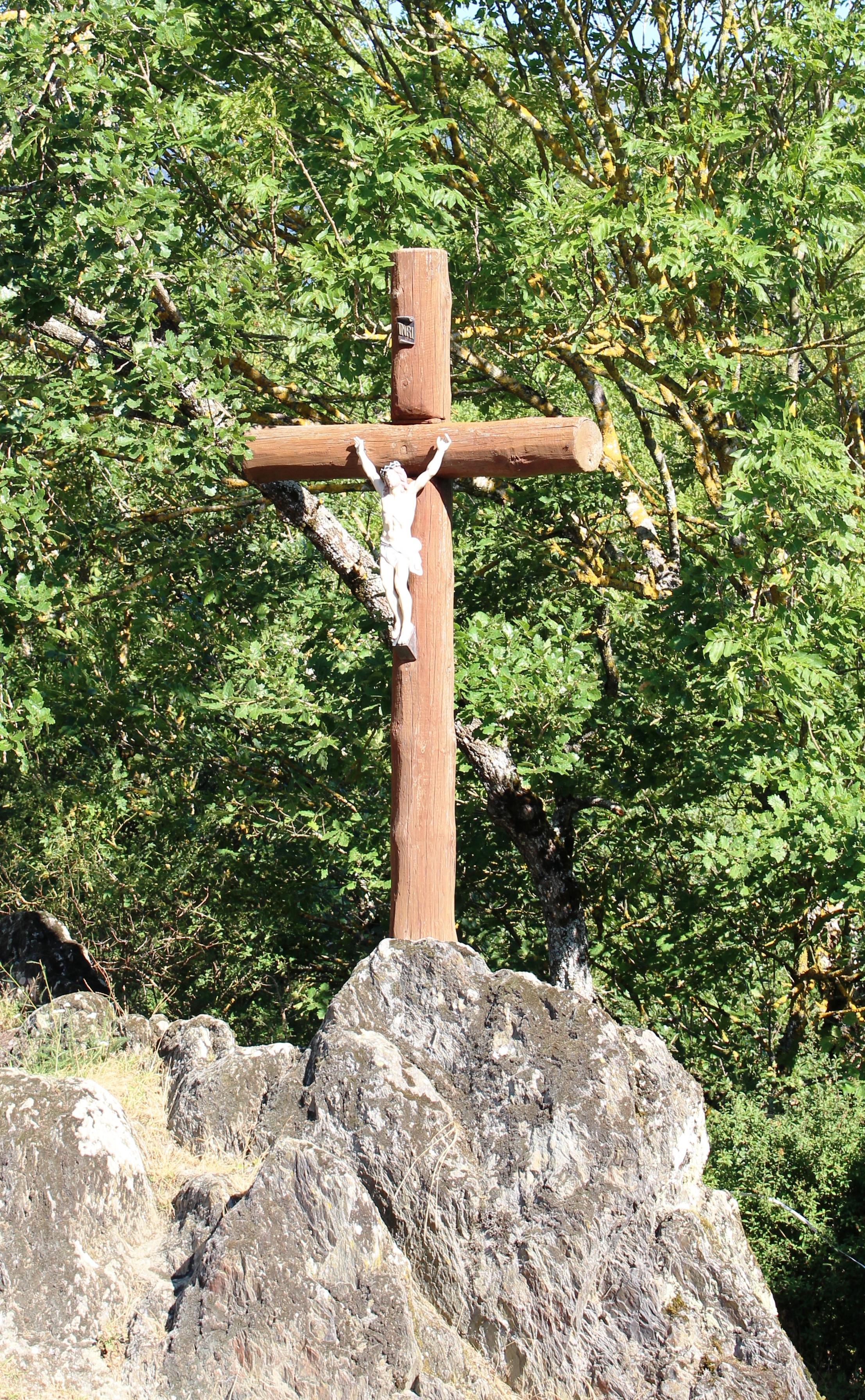 Croix de Pailhac (Hautes-Pyrénées)